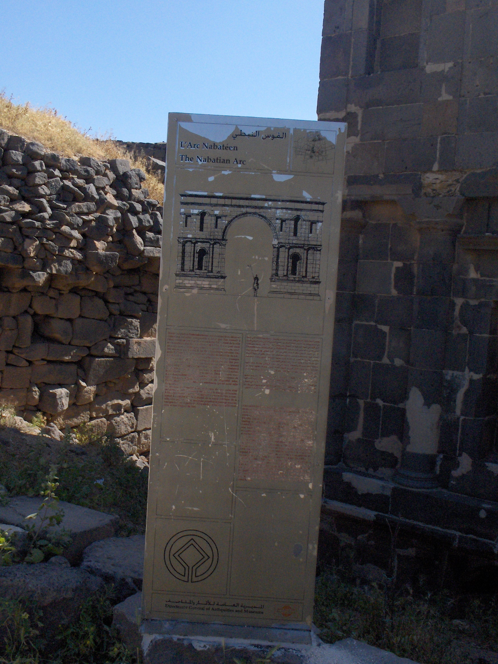 Ricostruzione dell'arco nabateo di Bosra, Siria